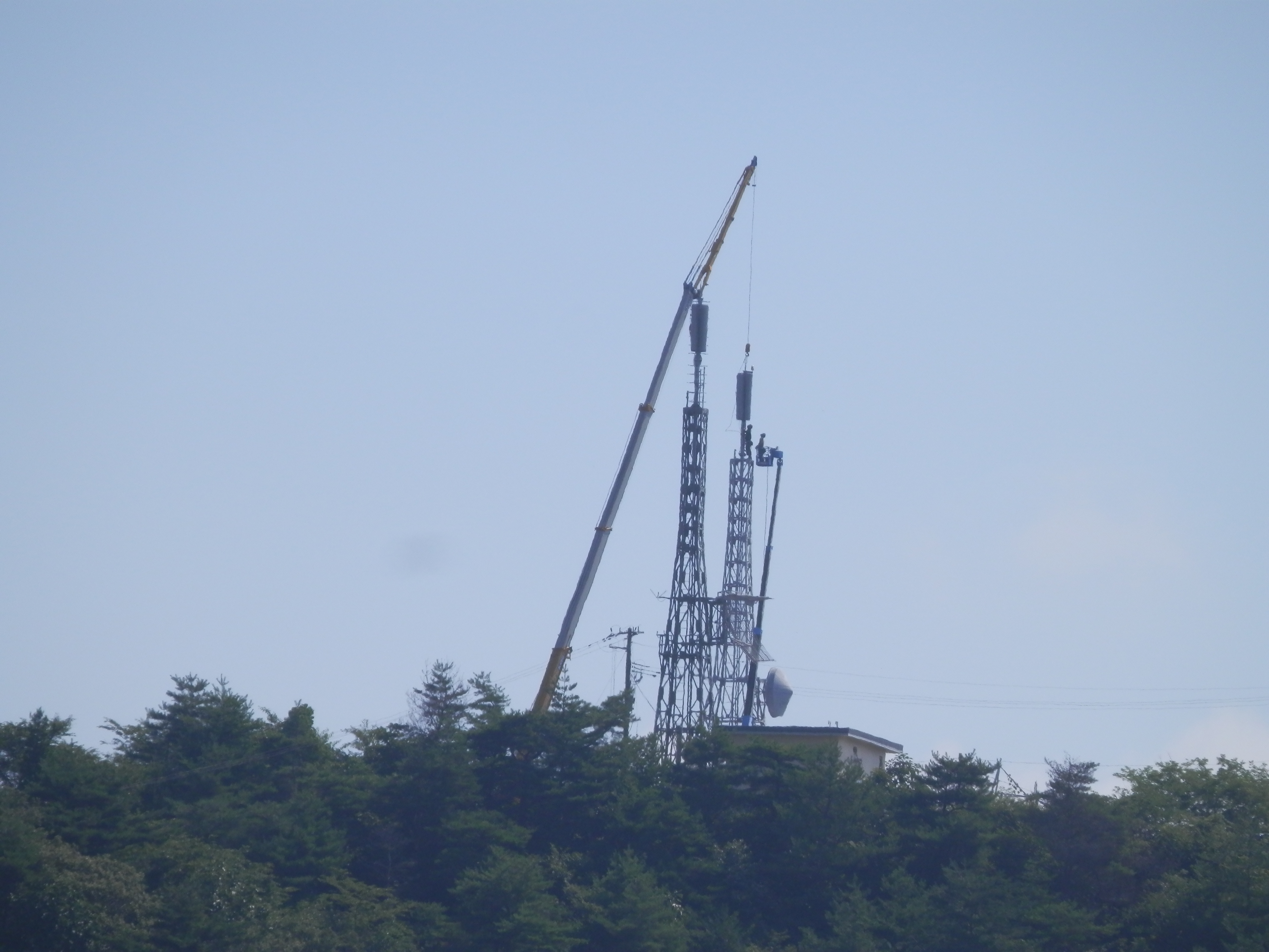 栗駒テレビ中継局 アナログ設備撤去風景(アンテナ撤去中)